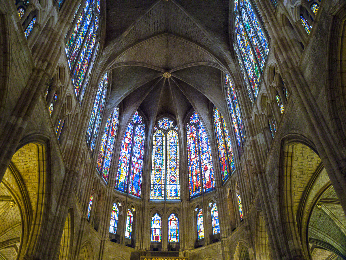 08082013 173721 LEÓN 0219